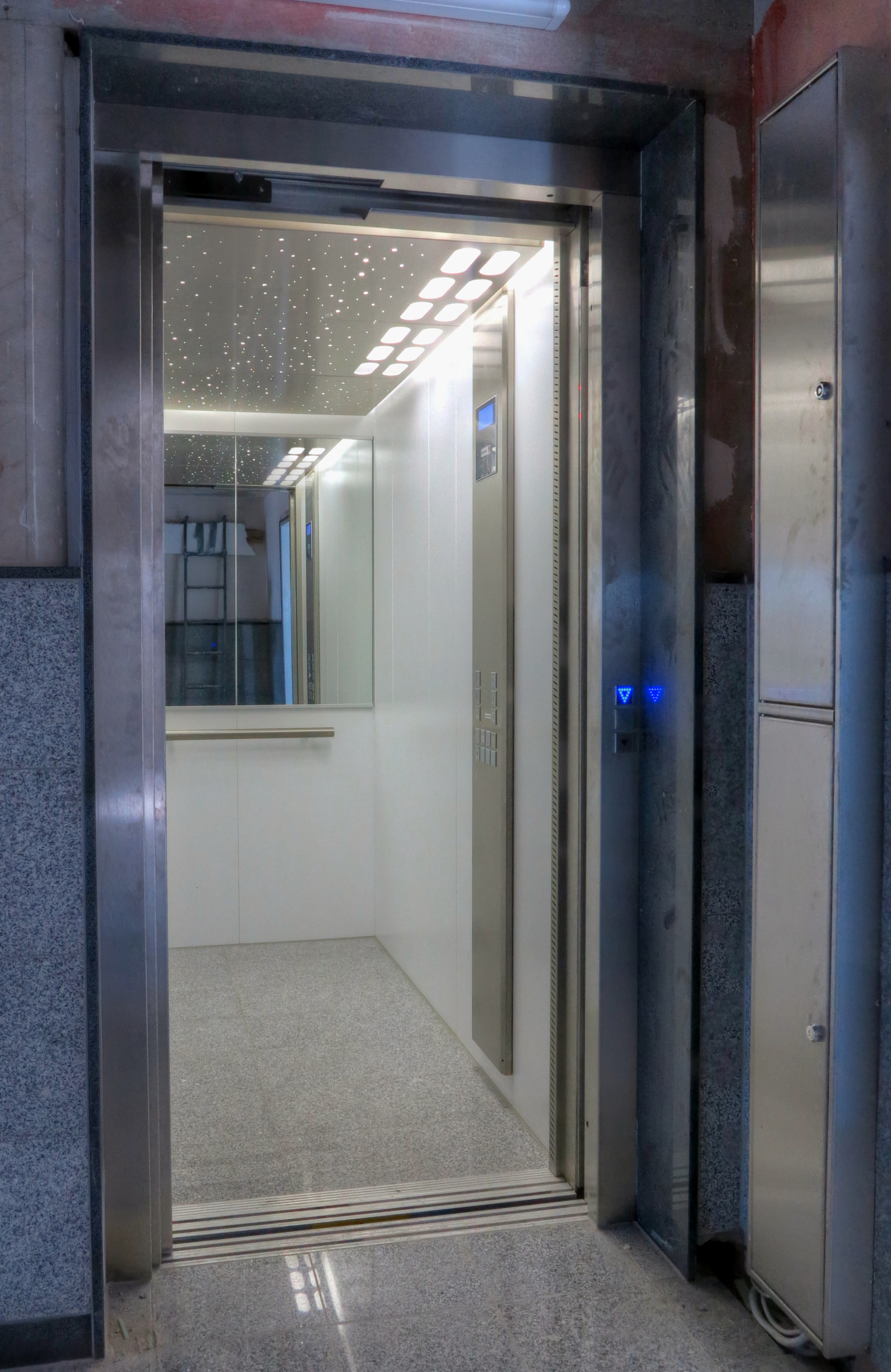 Personenaufzug mit Spiegel